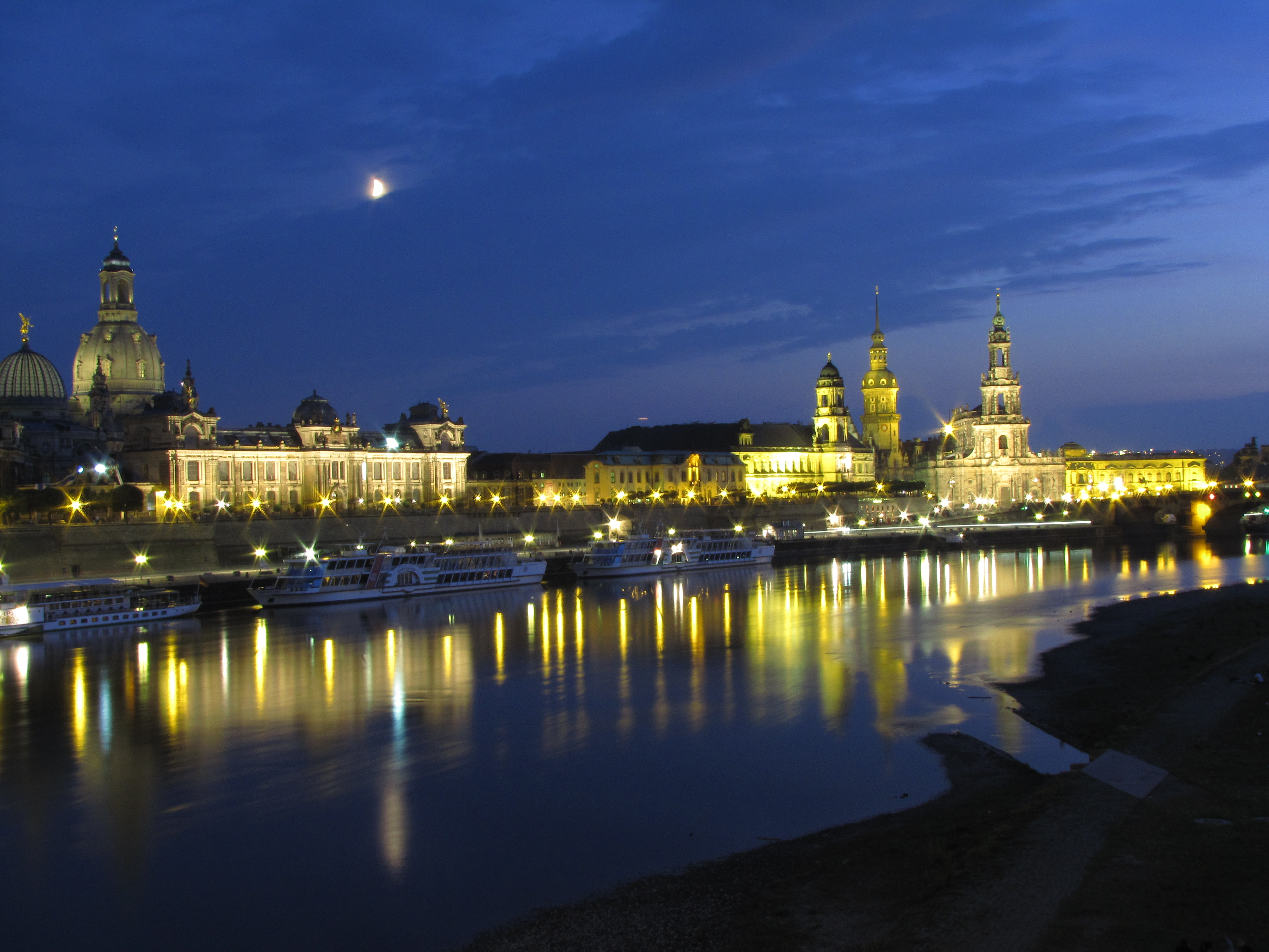 Dresdner Altstadt bei Nacht im Mondenschein